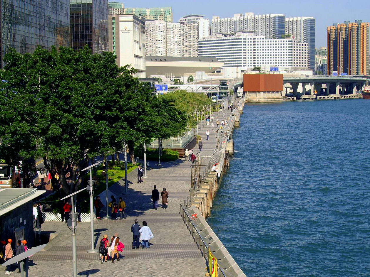 中文（香港）: 梳士巴利道旁的尖沙咀海濱長廊